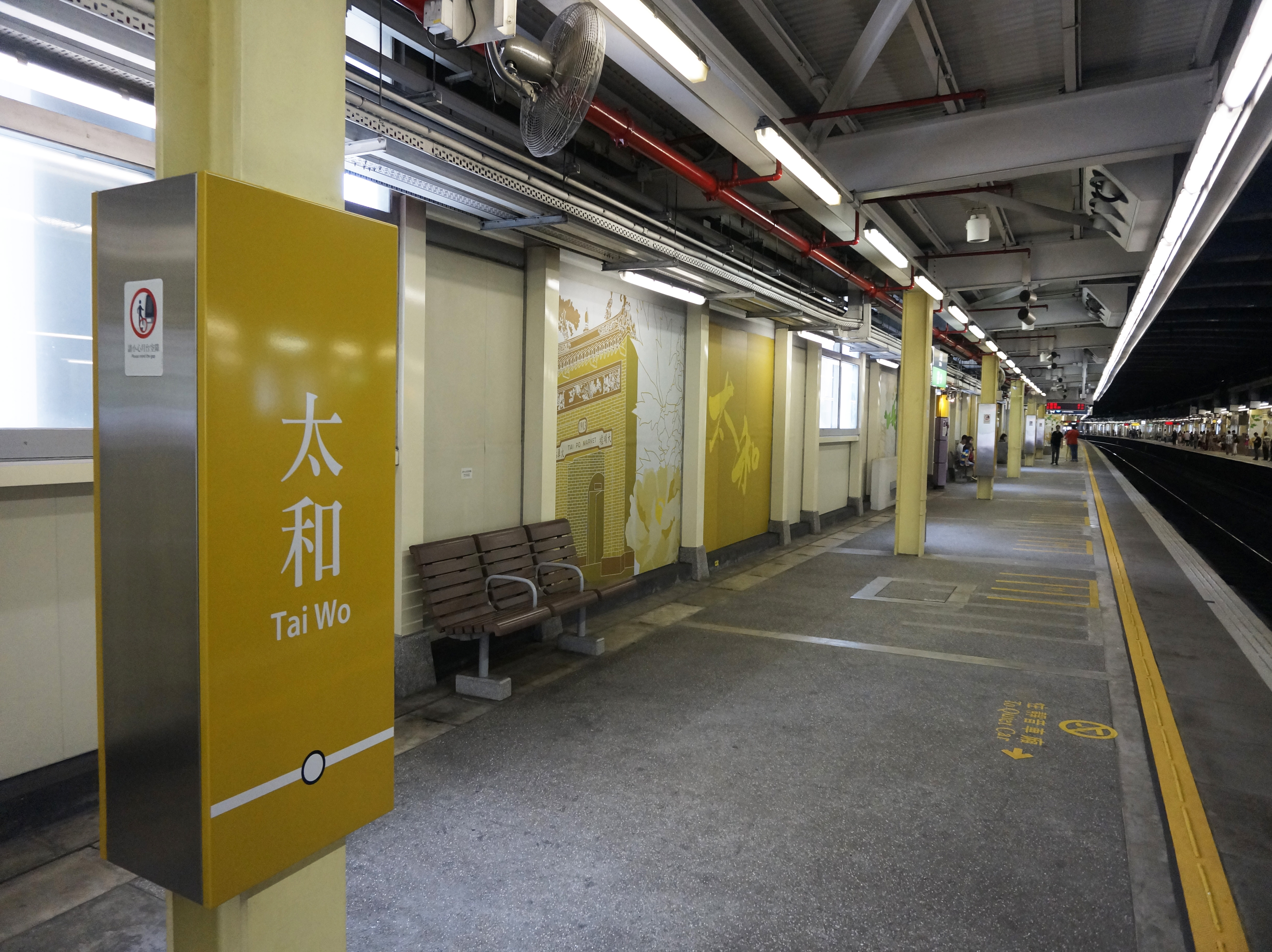 港鐵太和站月台